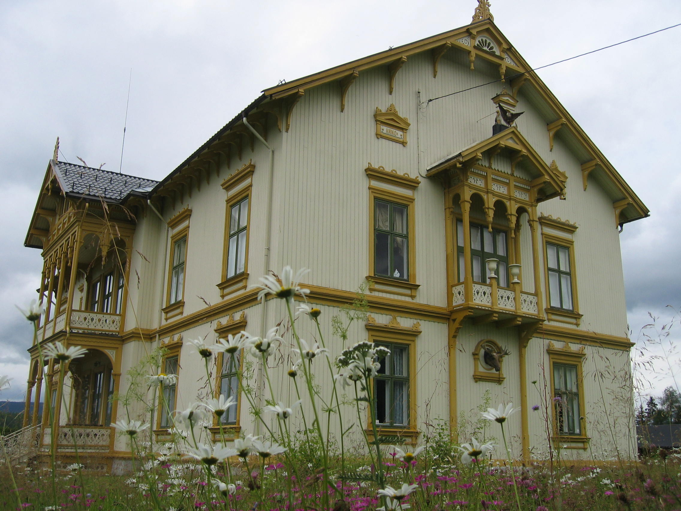 Hovedbygningen på Melgården